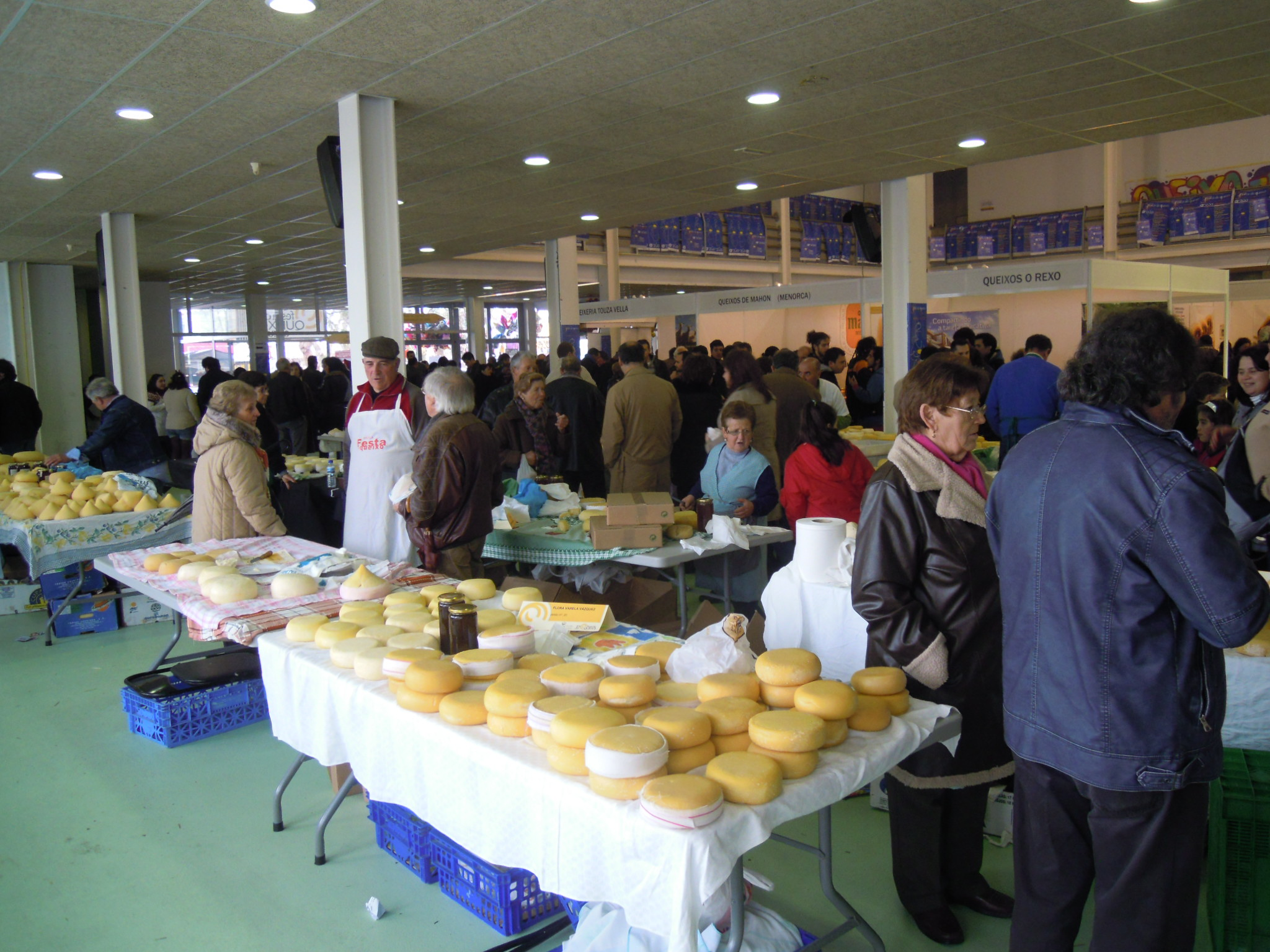 Festa do queixo de Arzúa, en Arzúa.